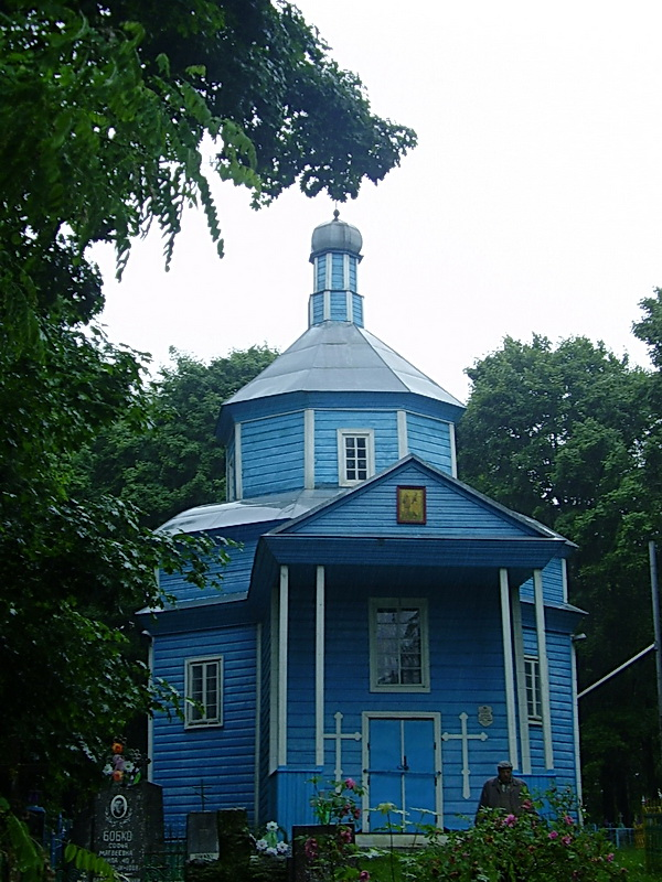 Галынка. Царква Св. Пятра і Паўла і брама-званіца